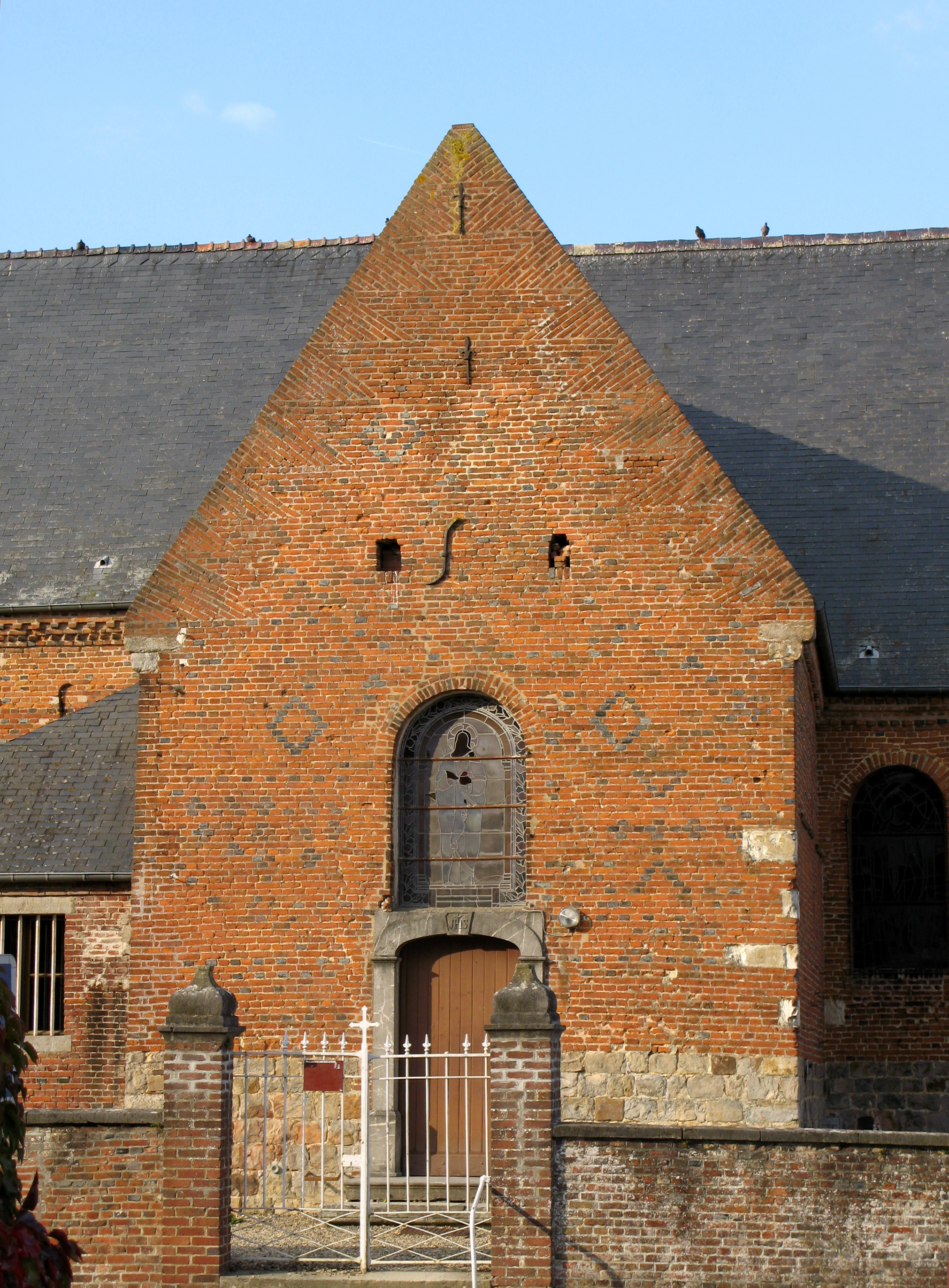 Autreppes (Aisne, France) - Le transept Sud de l'église fortifiée.